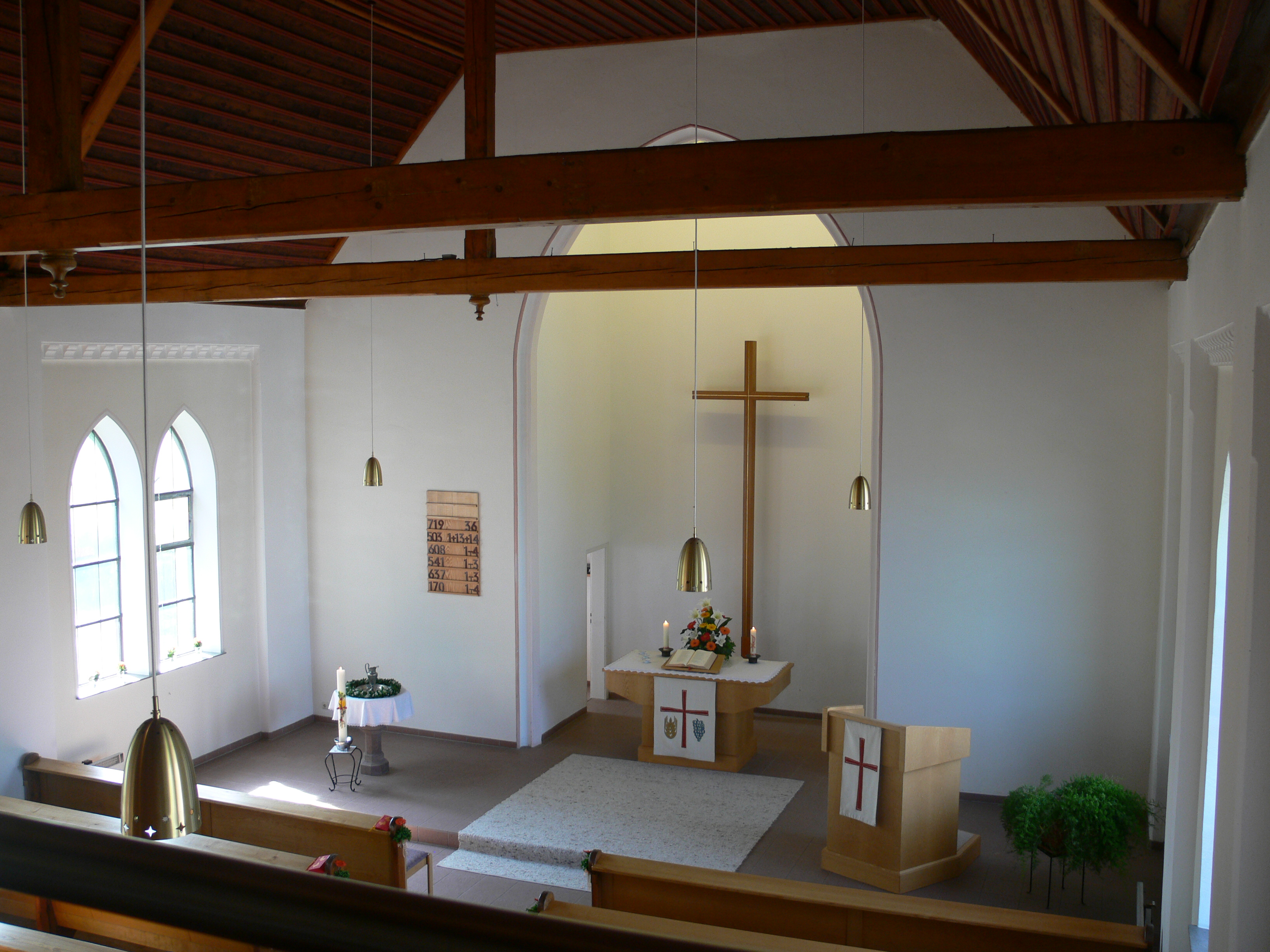 Evangelische Kirche Wälde-Winterbach, Horgenzell, Ortsteil Winterbach